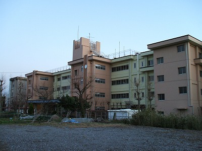 柏市立柏第五中学校校舎全景